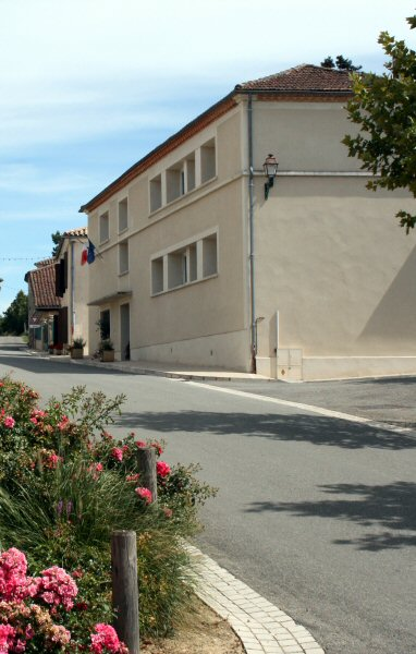 Mairie de Courrensan (Gers - France)